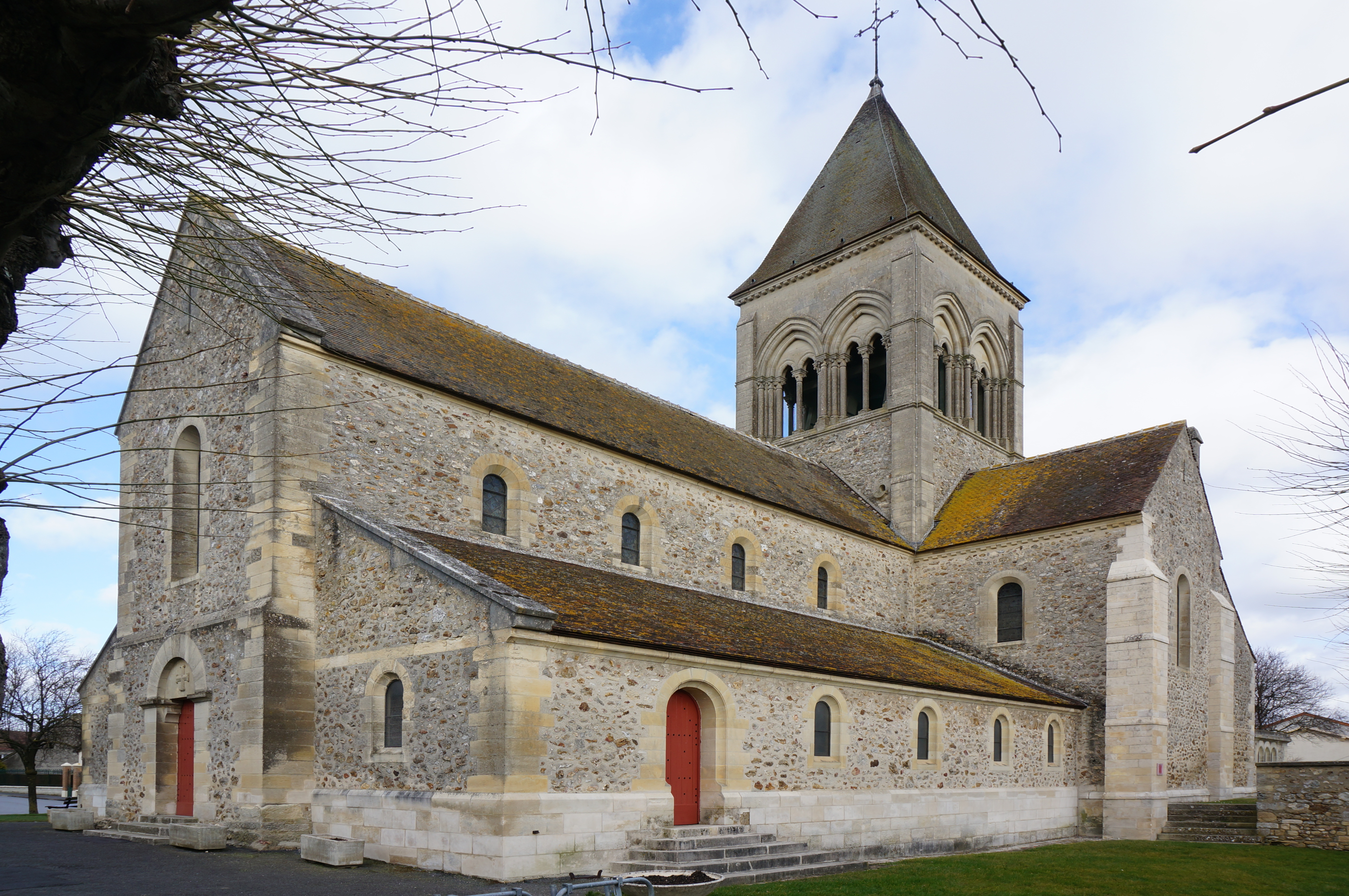 Vues de Beine-Nauroy.